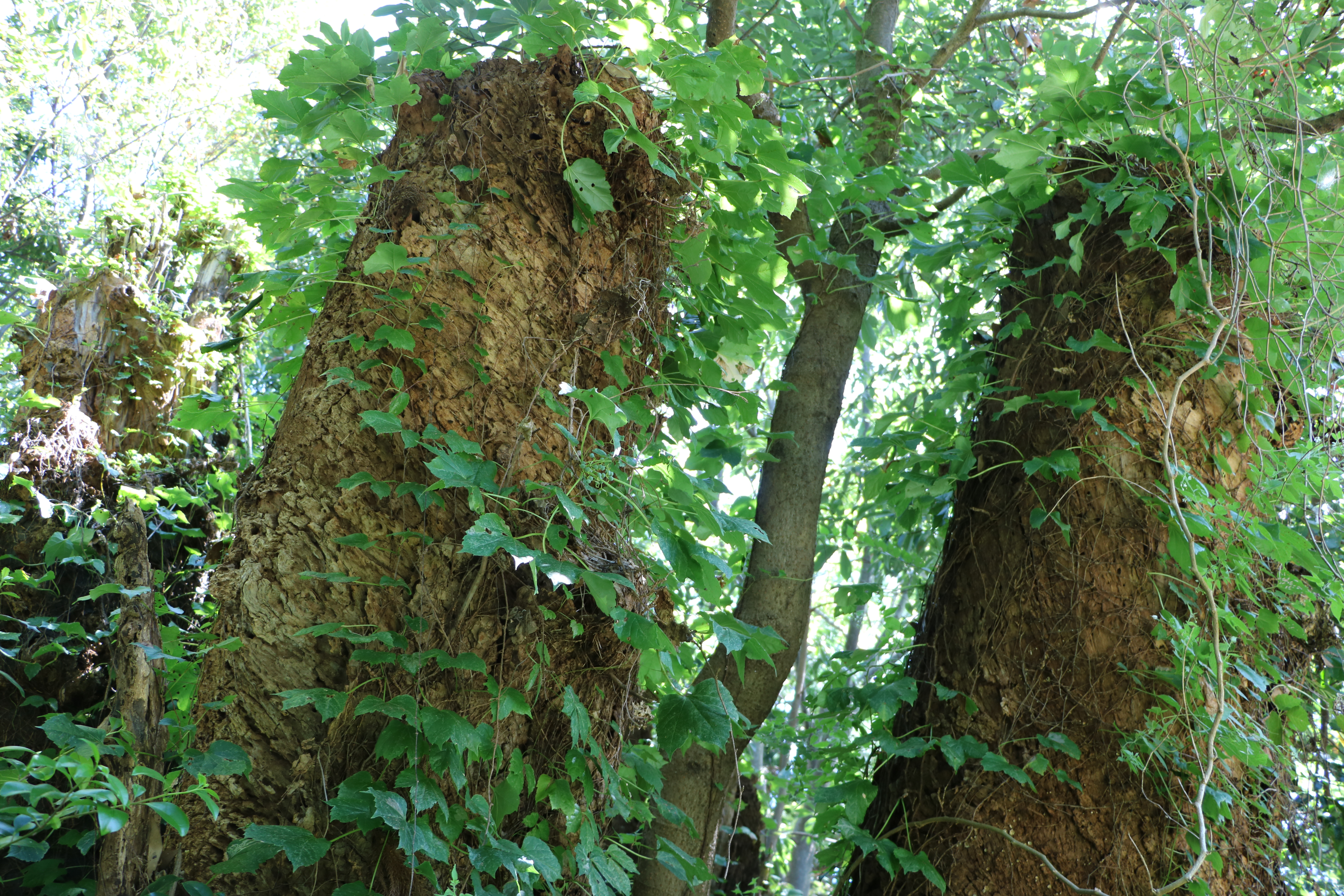 国指定天然記念物が解除された小浜神社の九本ダモの枯死した株（福井県小浜市）。